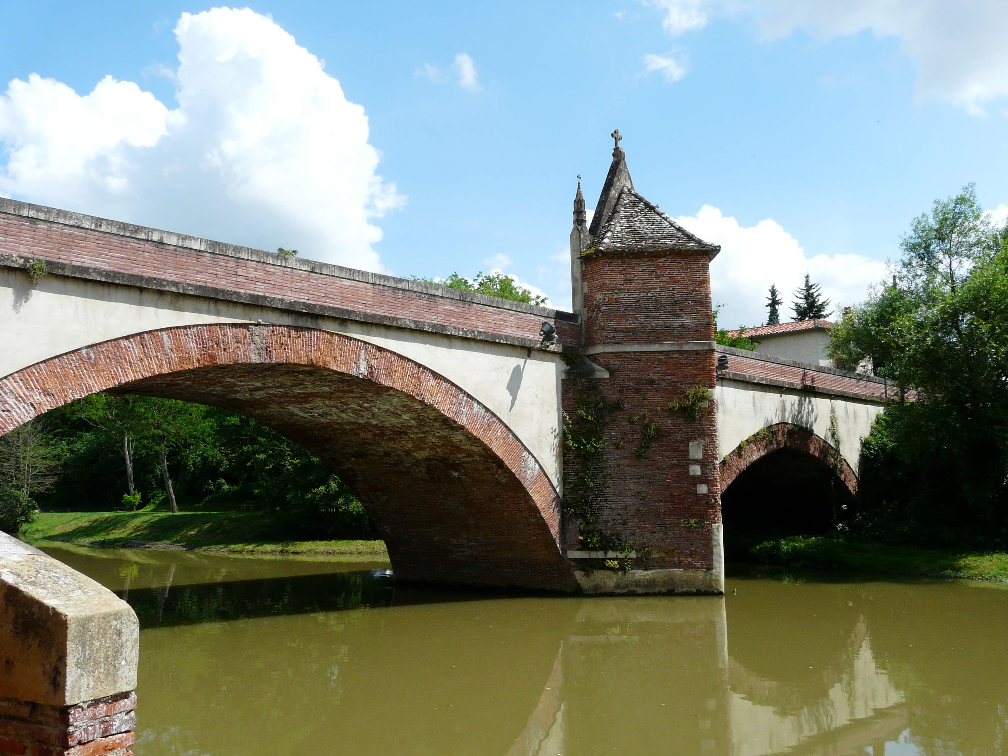 Le pont d'Auriac et sa chapelle Notre-Dame de Bonne Garde, Rieux-Volvestre, Haute-Garonne, France.